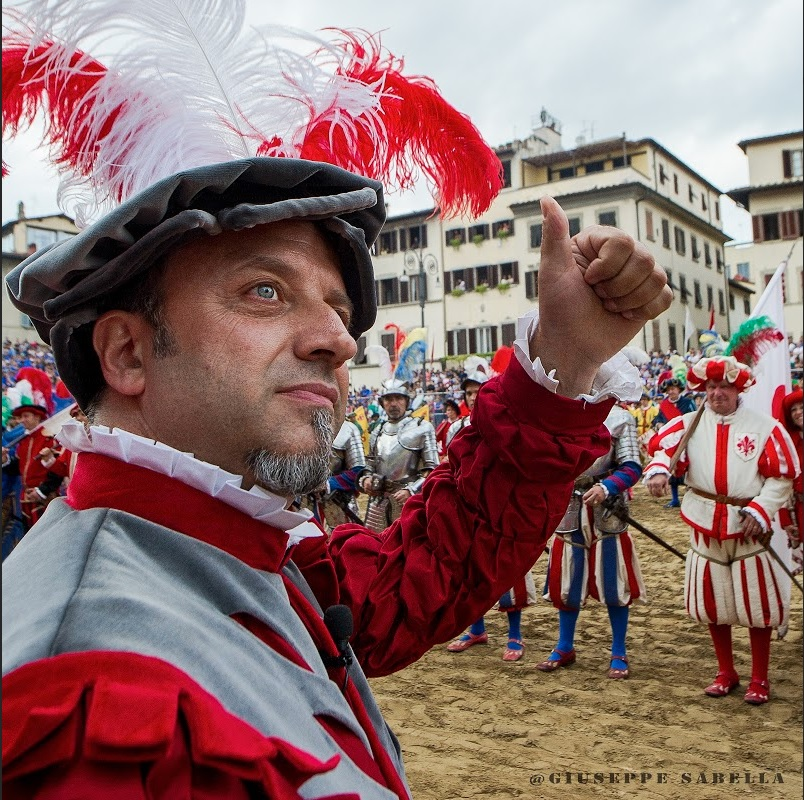 Direttore del Corteo Storico della Repubblica Fiorentina e del Calcio Storico Fiorentino